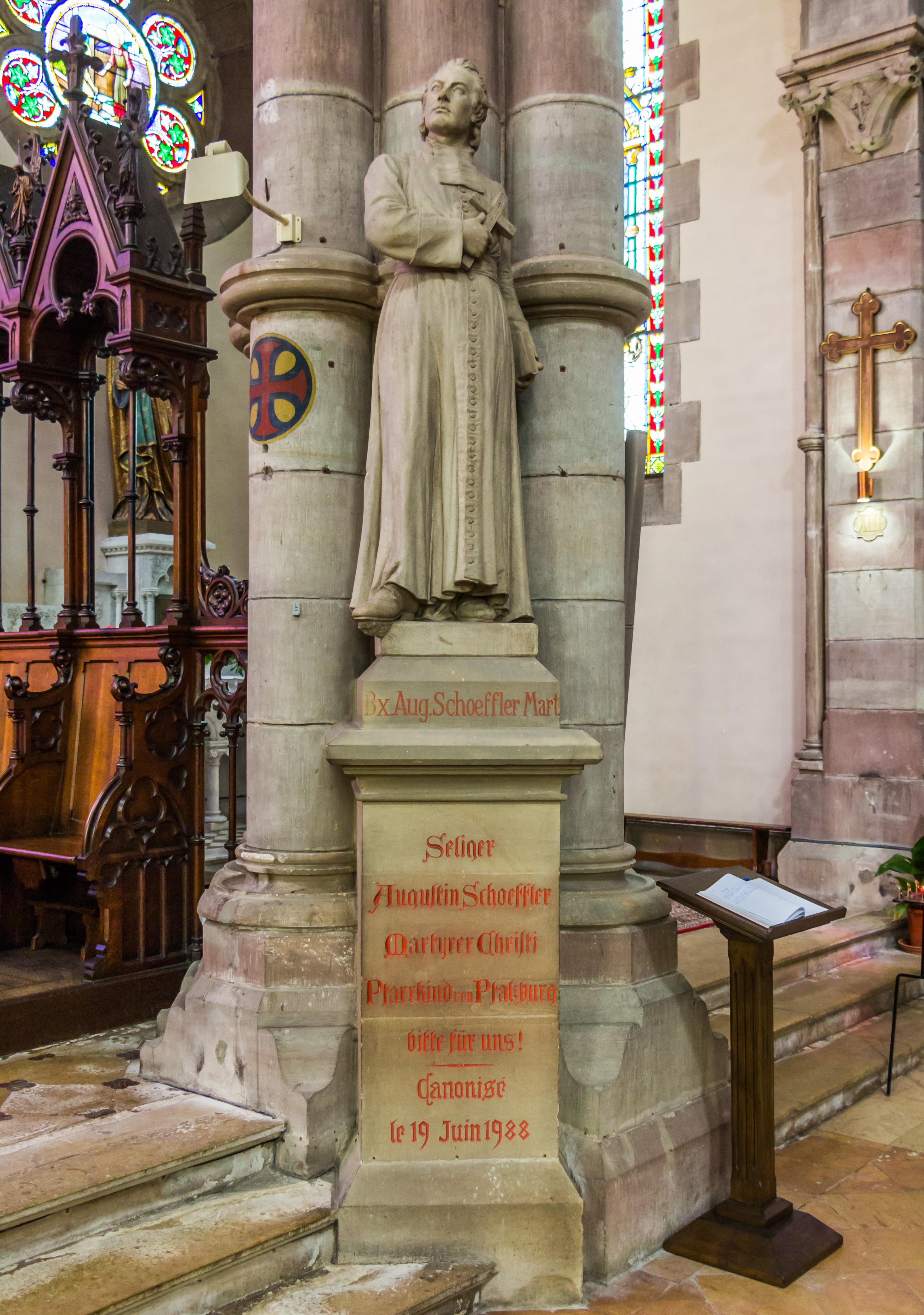 Statue des Martyrers August Schoeffler in der Kirche Notre-Dame-de-l'Assomption, Phalsbourg